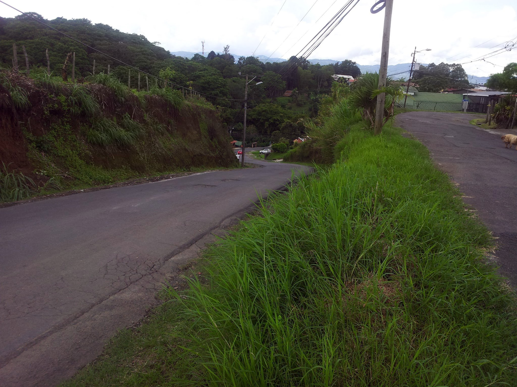 Bajando de La Estéfana